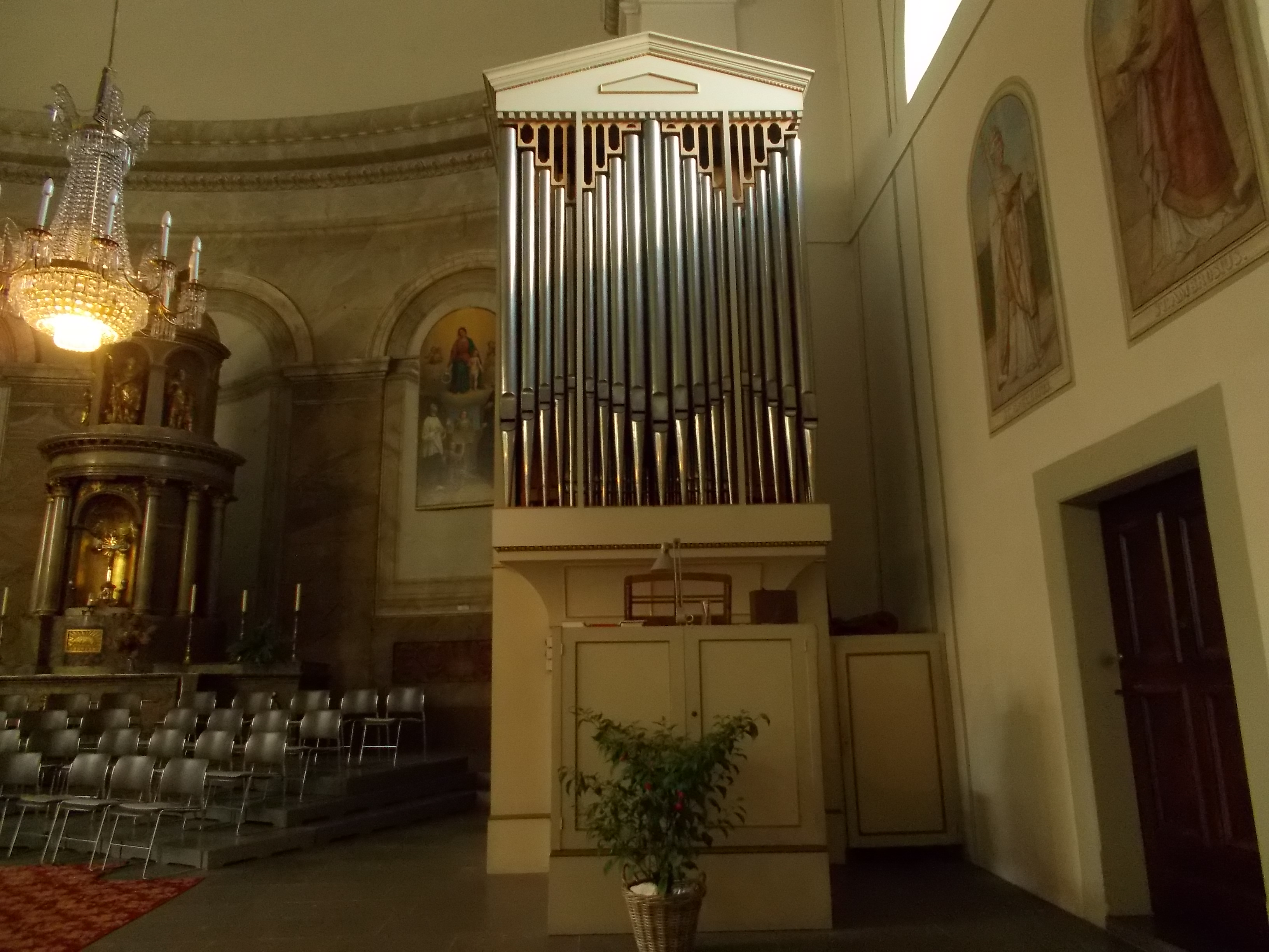 Prospekt der Chororgel